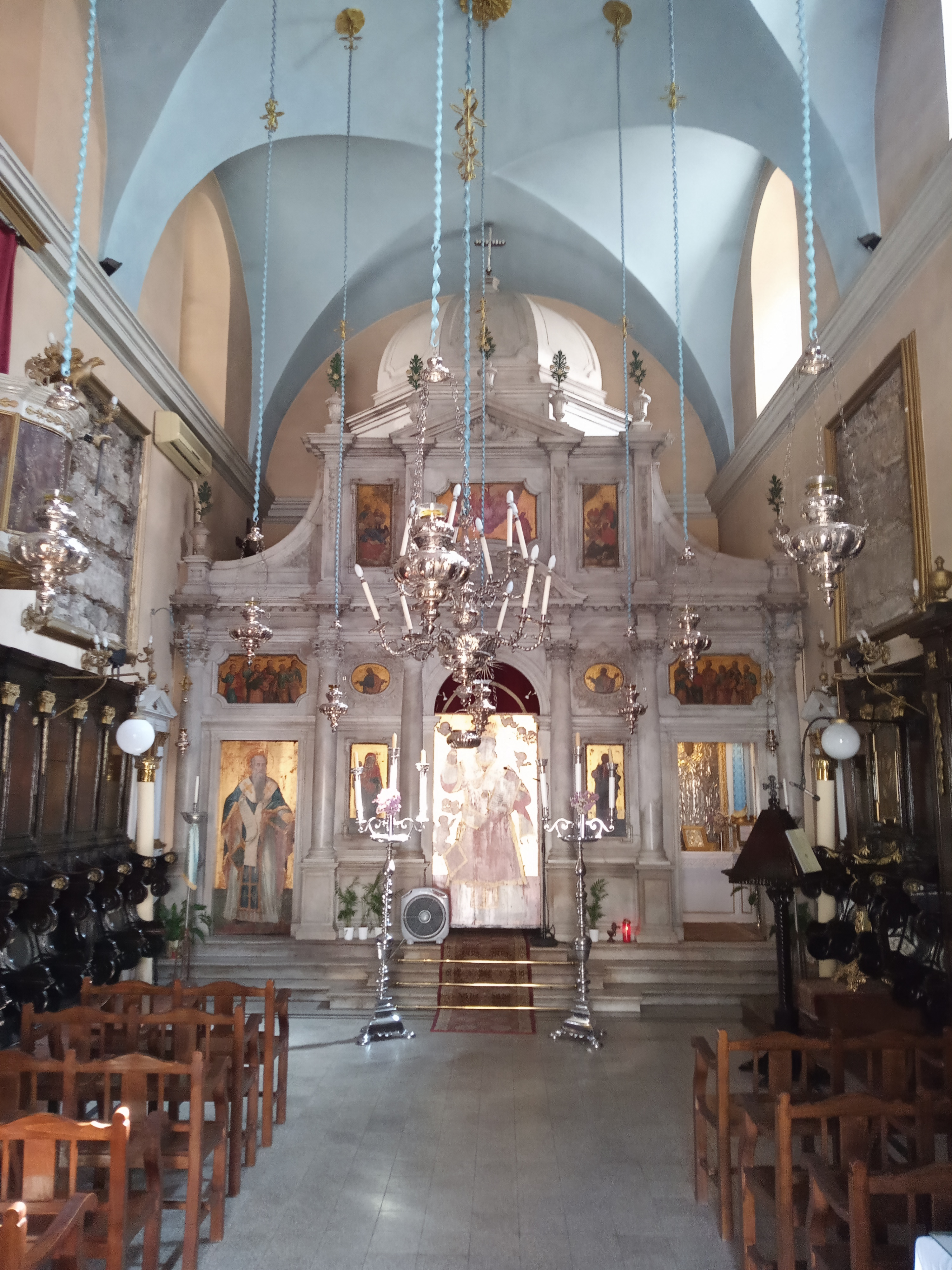 Церква Святих Антонія і Андрія Корфу, Іконостас